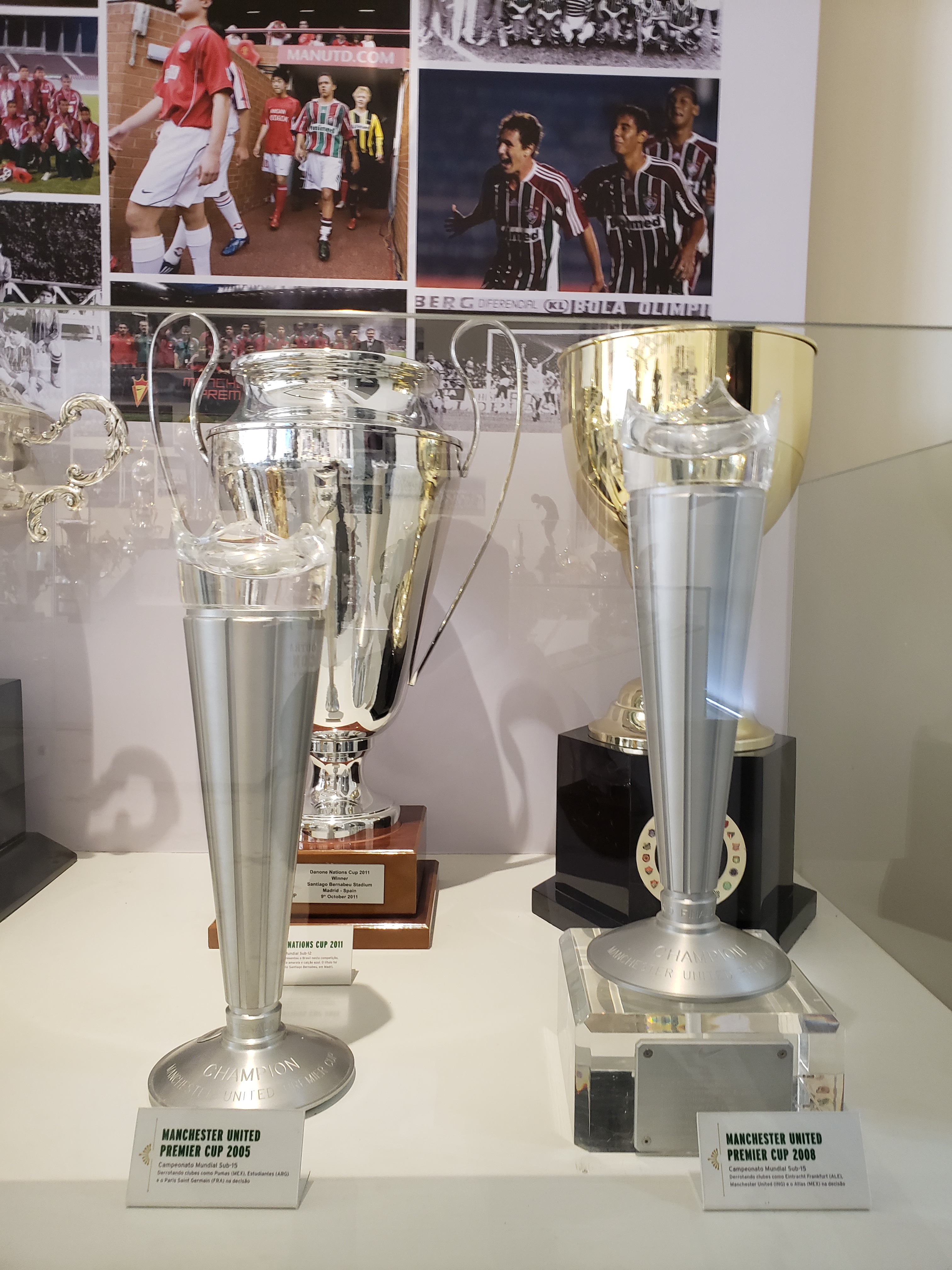 Manchester United Premier Cup 2005 e 2008 (autorizados pela FIFA como Campeonato Mundial de Clubes Sub-15) e Danone Nations Cup Sub 13 de 2011, conquistados pelo Fluminense Football Club.